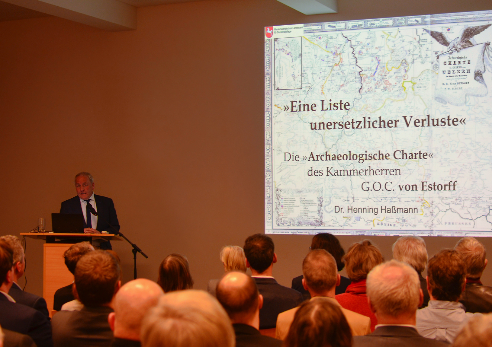 Vortrag bei der Vorstellung des Denkmalatlas Niedersachsen durch den Landesarchäologen Henning Hassmann vom Niedersächsischen Landesamt für Denkmalpflege im Niedersächsischen Landesamt für Denkmalpflege